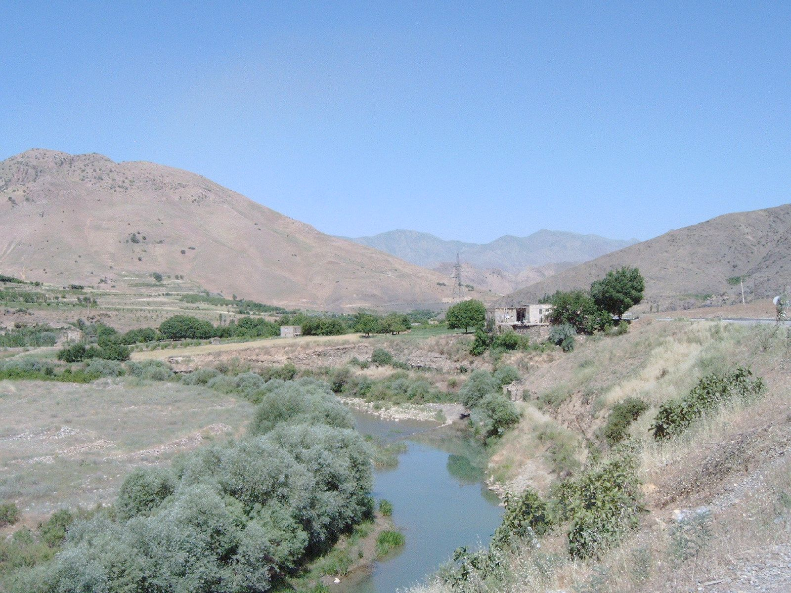 Landschaft im iranischen Kurdistan Autor:Mr.minoque Mai 2005 Landscape in Iran/Kurdistan